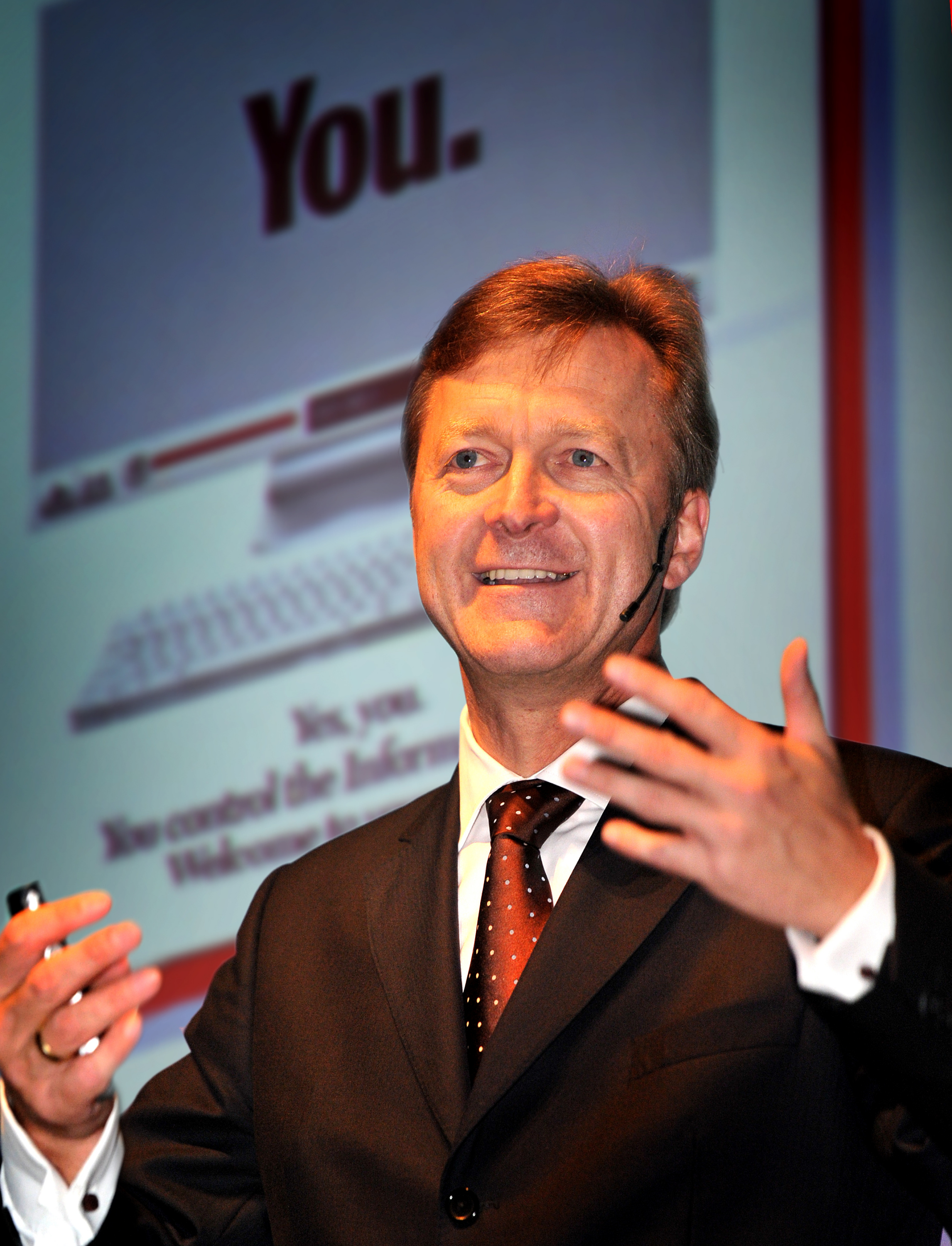 Prof. Dr. Ewald Wessling